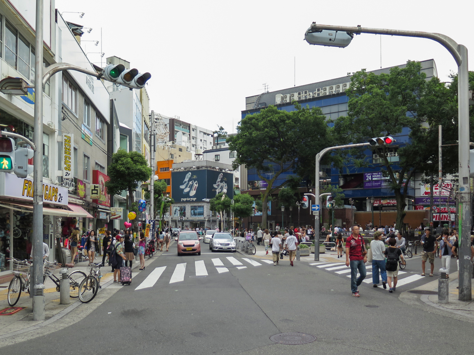 Amerika-mura